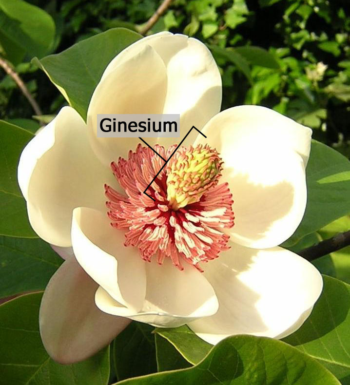 Die stempel van 'n blom